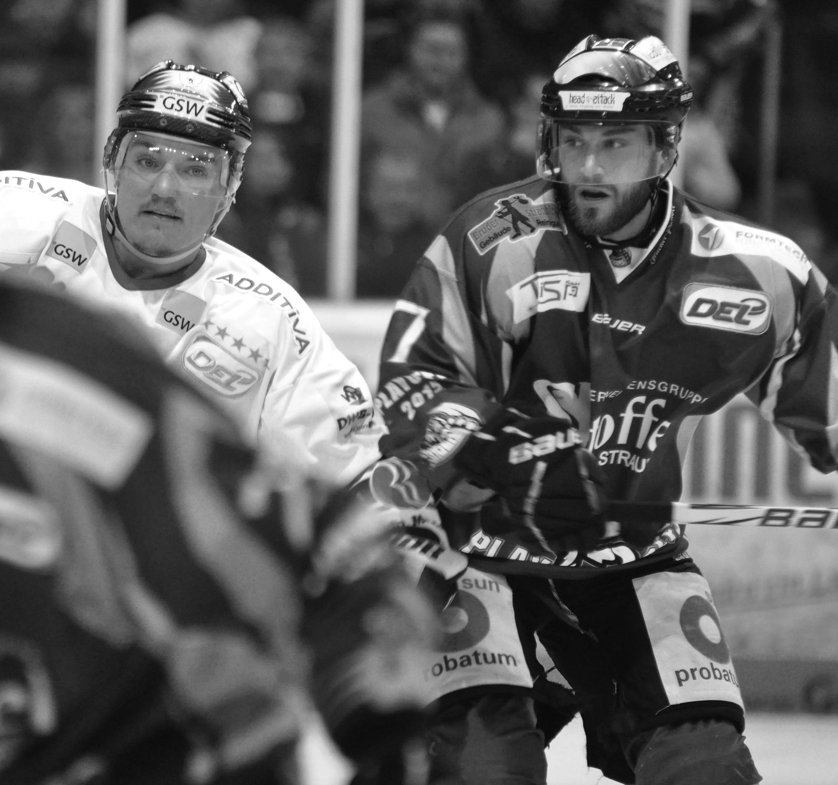 Straubing Tigers - Eisbären Berlin 11.04.2012 DEL PlayOff Halbfinale